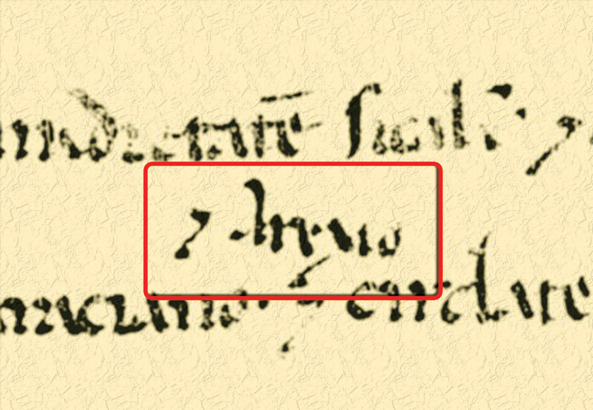 La prima scitta Arese su una pergamena del 1185